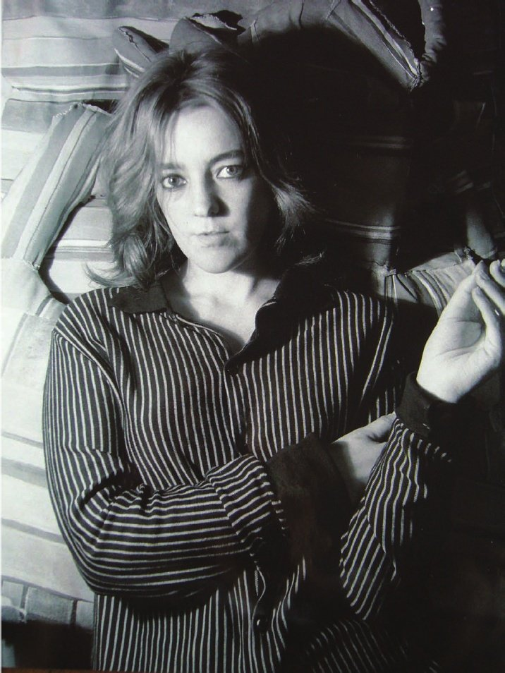 Fotografía de la artista Marta Minujín que transitó por los movimientos del arte conceptual, del pop art, del arte psicodélico, del informalismo y del vanguardismo.